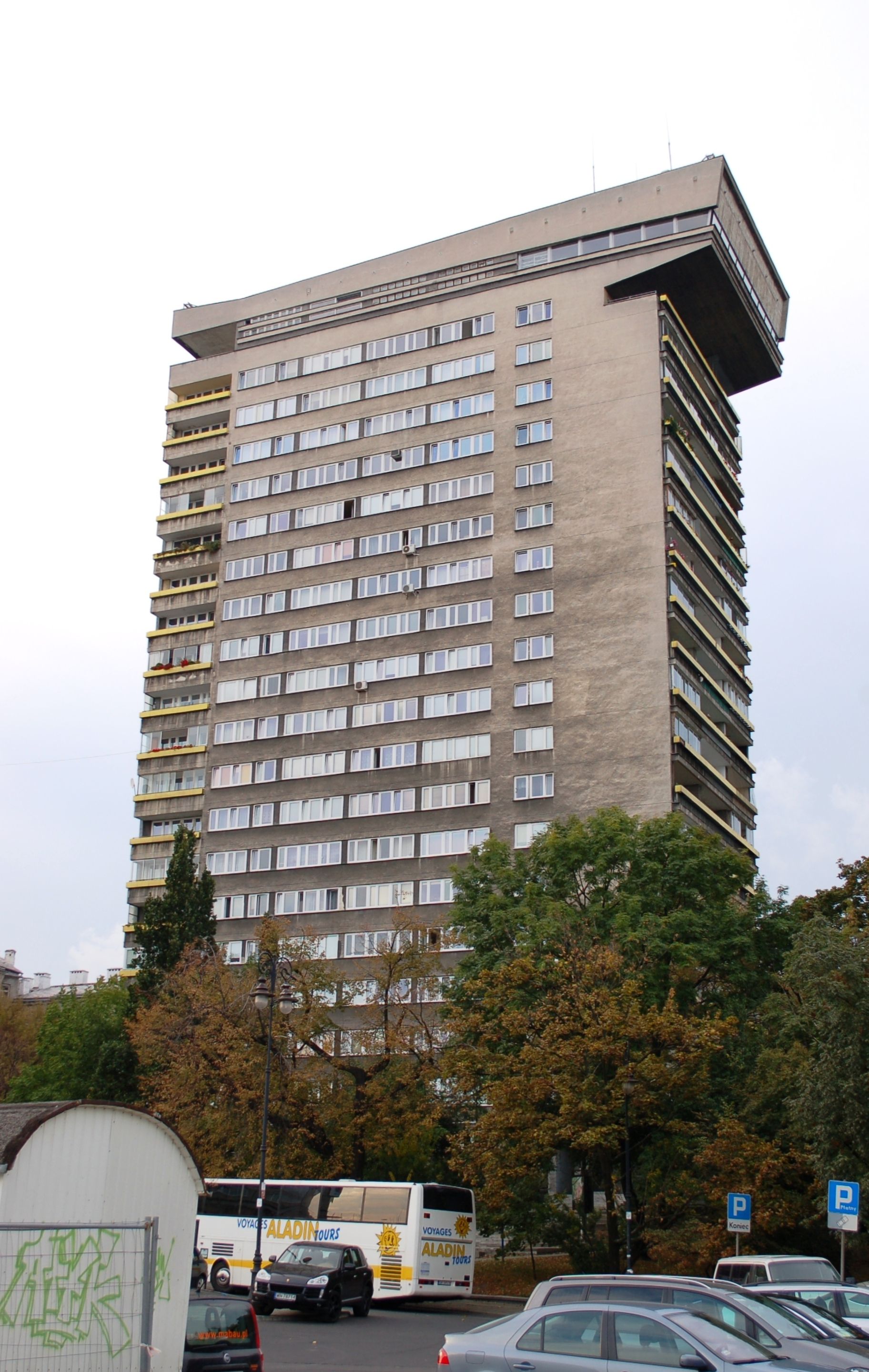 Jerozolimskie, Warschau